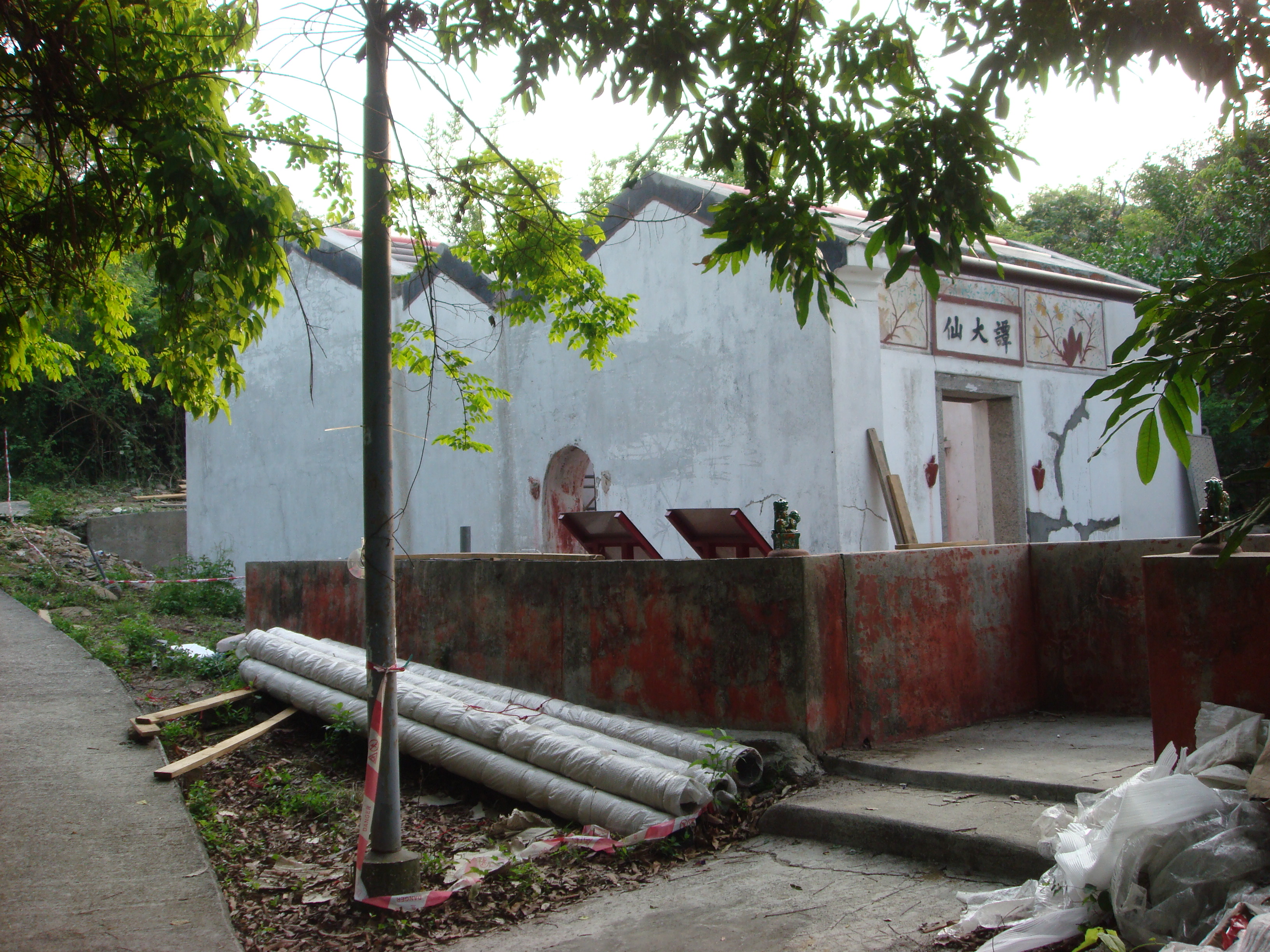 Tam Tai Sin Temple, Sha Tau, Tung Ping Chau, Hong Kong. Dedicated to Tam Tai Sin, also known as "Tam Kung" .